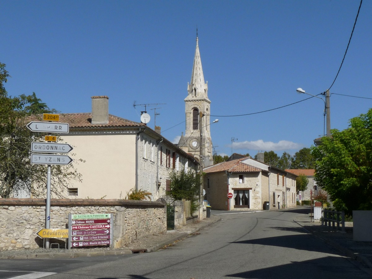 St-Germain-d'Esteuil, Gironde, France